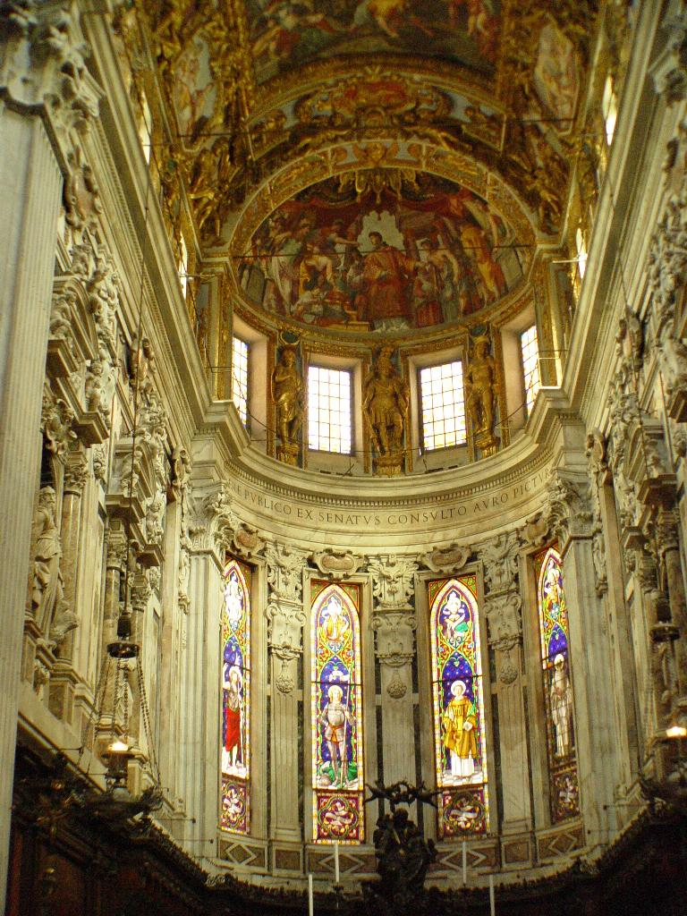 Interno della Cattedrale di San Lorenzo a Genova.